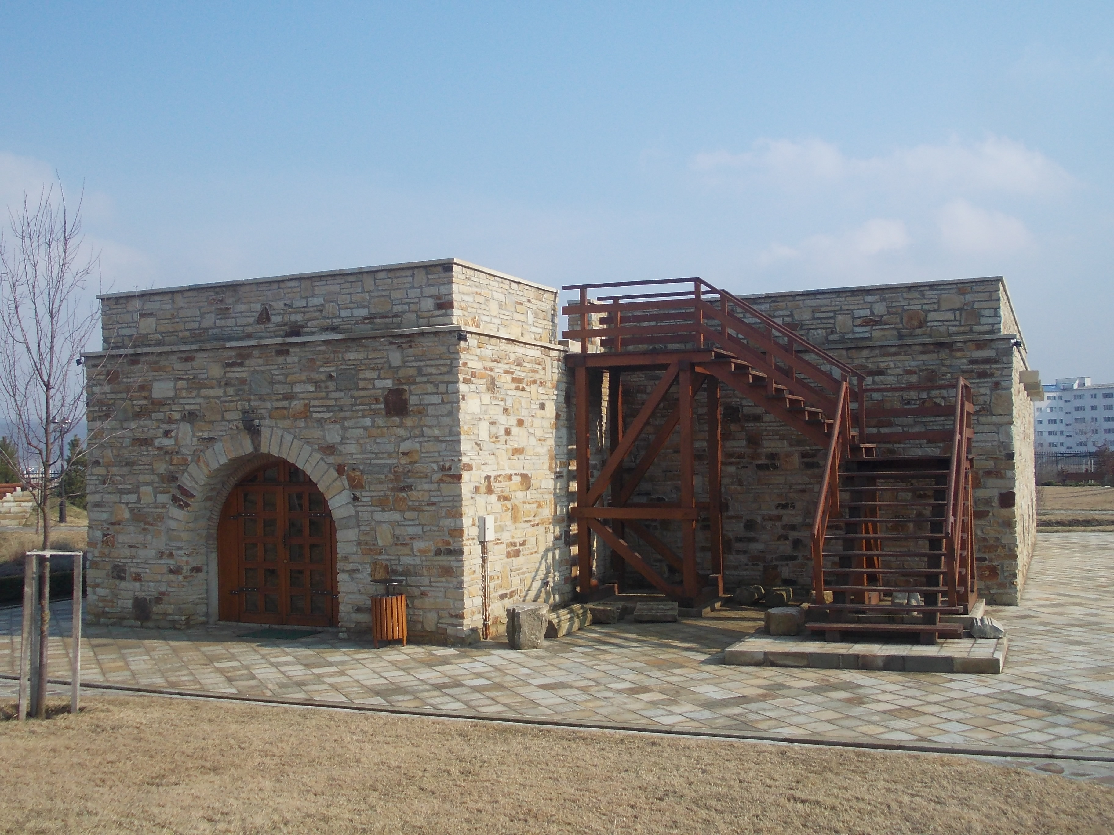 Clădire în Ansamblul Curţii Domneşti din Vaslui